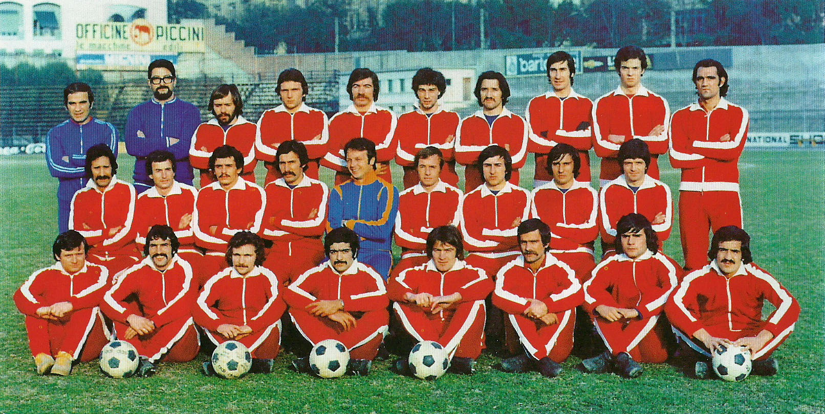 The first-team squad of A.C. Perugia in the 1974–75 season, posing inside the Santa Giuliana Stadium in Perugia (Italy). From left to right, top: G. Molinari (assistant coach), Molini (athletic trainer), P. Sollier, P. Frosio, R. Marconcini, W. Sabatini, F. Zana, F. Vannini, Farabbi, M. Vitulano; middle: Palomba (masseur), G. Picella (captain), M. Nappi, M. Scarpa, I. Castagner (coach), G. Savoia, M. Marchei, S. Pellizzaro, C. Tinaglia; bottom: R. Luchini (masseur), M. Amenta, R. Curi, G. Raffaeli, N. Malizia, B. Baiardo, C. Giubilei, Ricci.